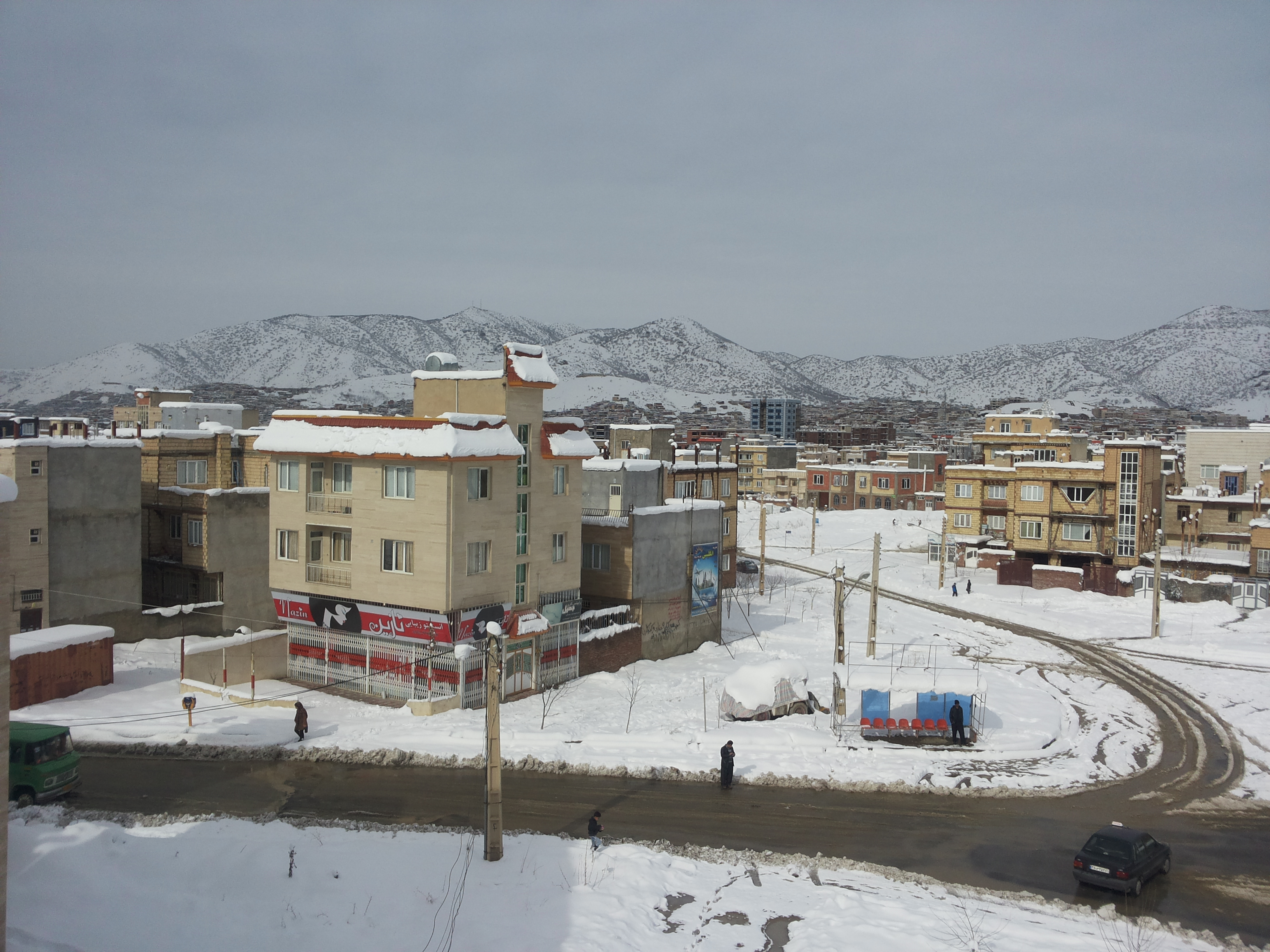 کوردیی ناوەندی: مەریوان، گەڕەکی بەھاران، بەفرێکی قورس لە سەرەتای ٢٠١٥دا